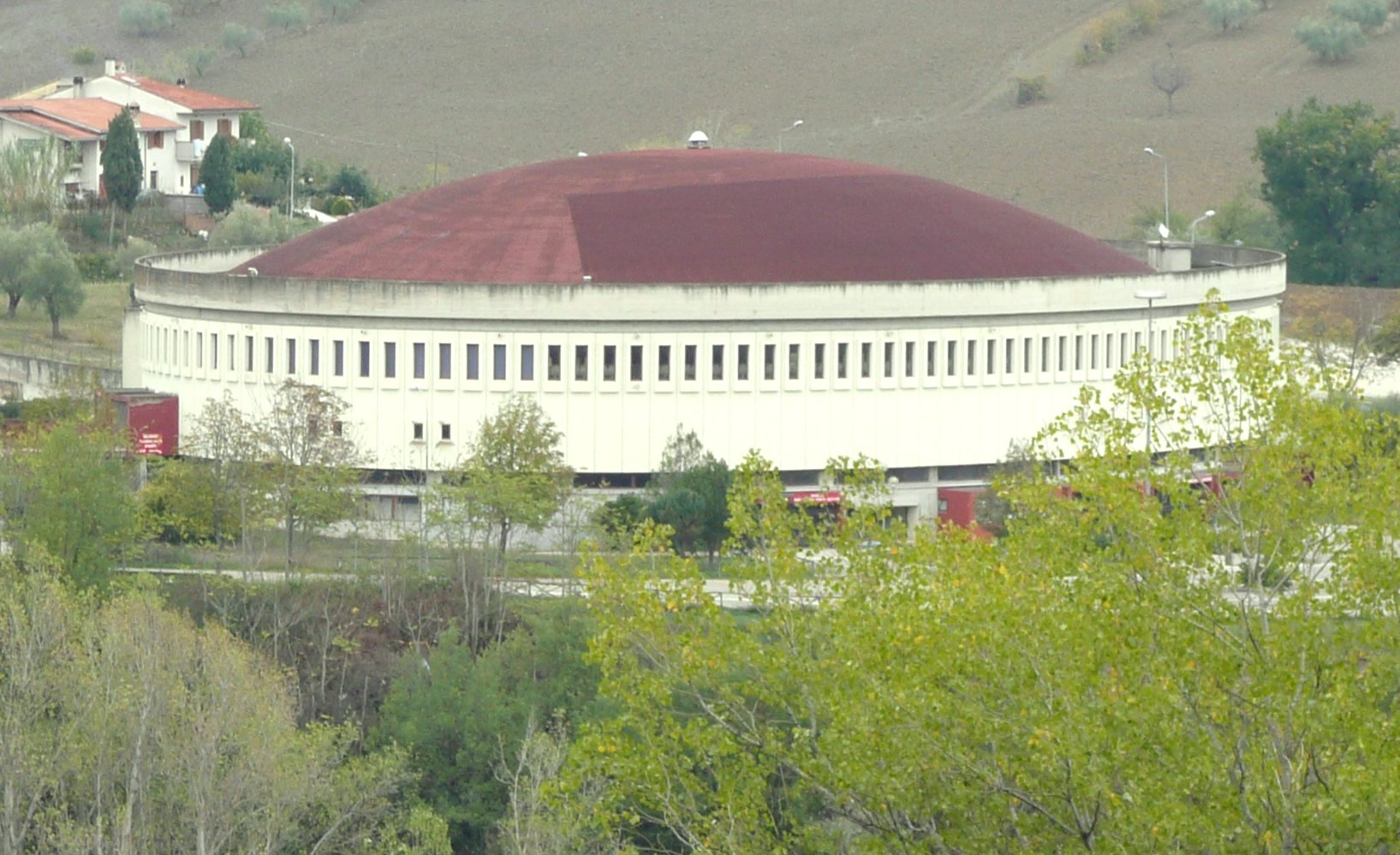 Palazzetto dello sport di Teramo